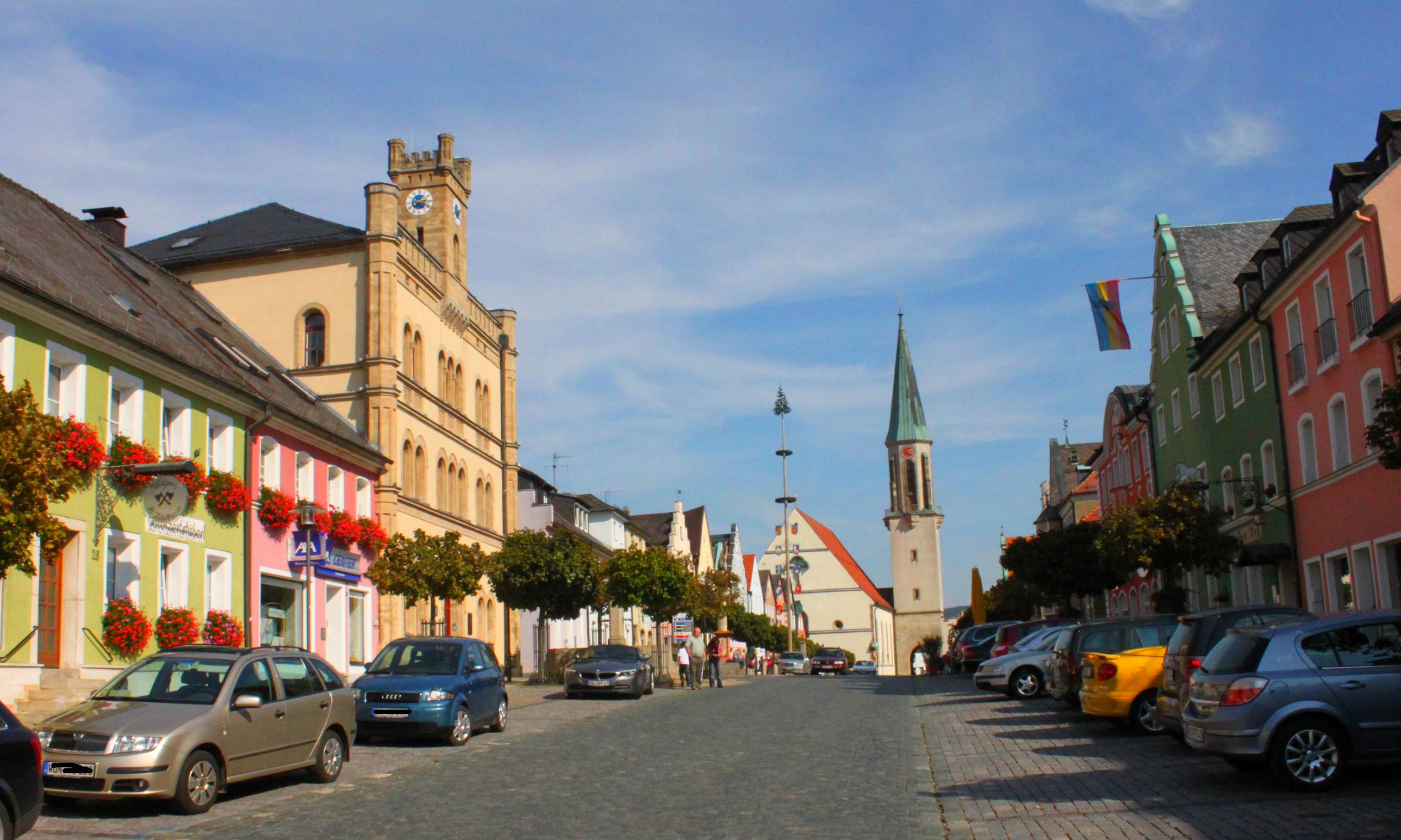 Der Stadtplatz von Kemnath mit der Pfarrkirche Mariä Himmelfahrt